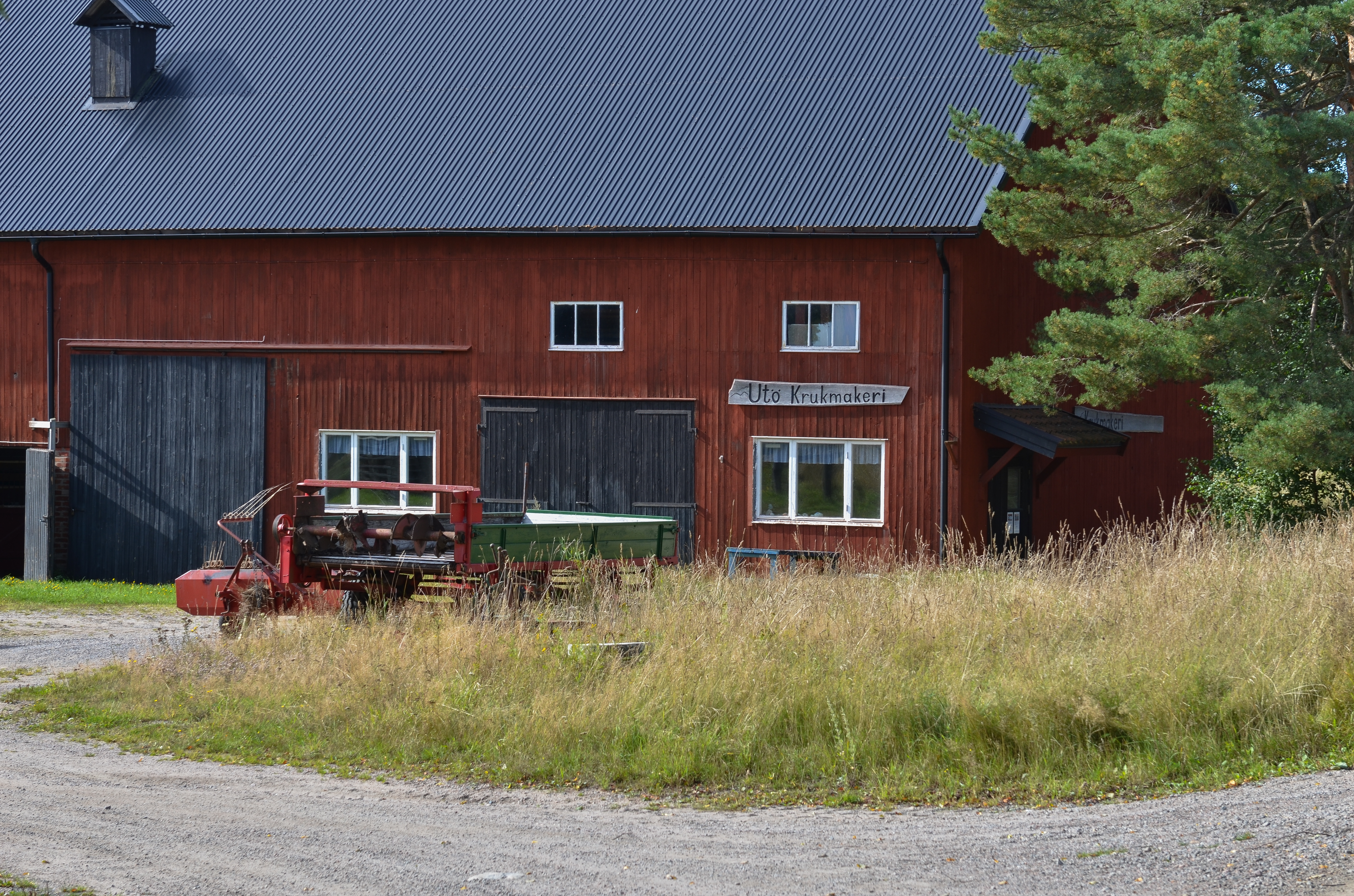 Buildings in Edesnäs, a small village at Utö island, Haninge Municipality, Stockholm archipelago.